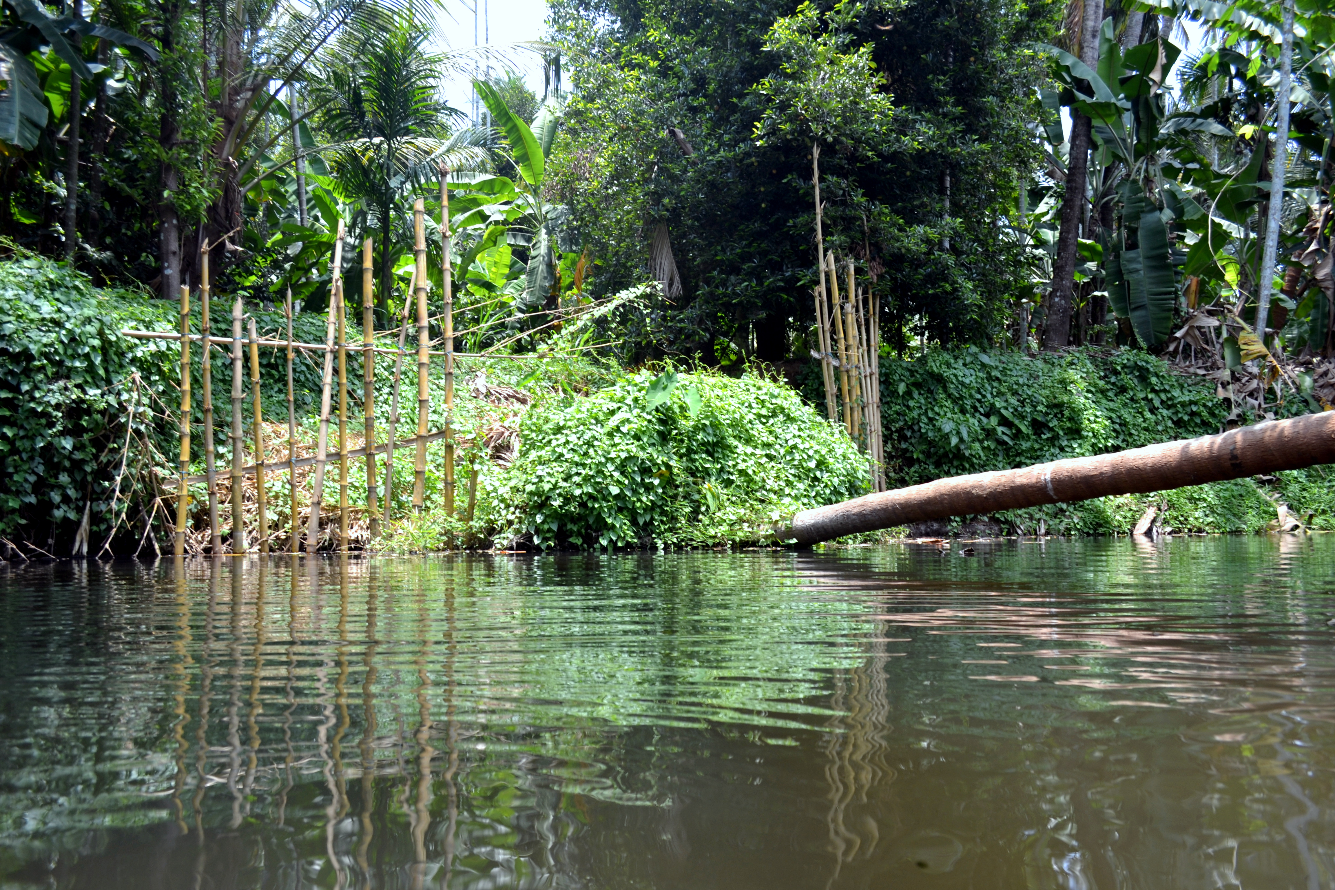 താണിക്കുടം പുഴ മദ്ധ്യവേനൽ സമയത്തു്